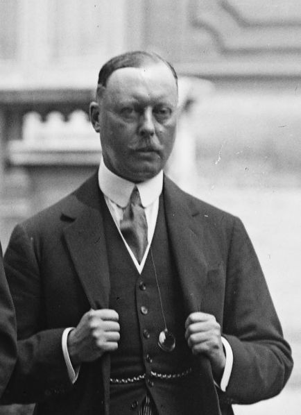 18/6/21, au Quai d'Orsay, [Robert] Vansittart, [Charles] Hardinge, [George] Curzon, [Aristide] Briand, [Philippe] Berthelot [devant le ministère des affaires étrangères] : [photographie de presse] / [Agence Rol]